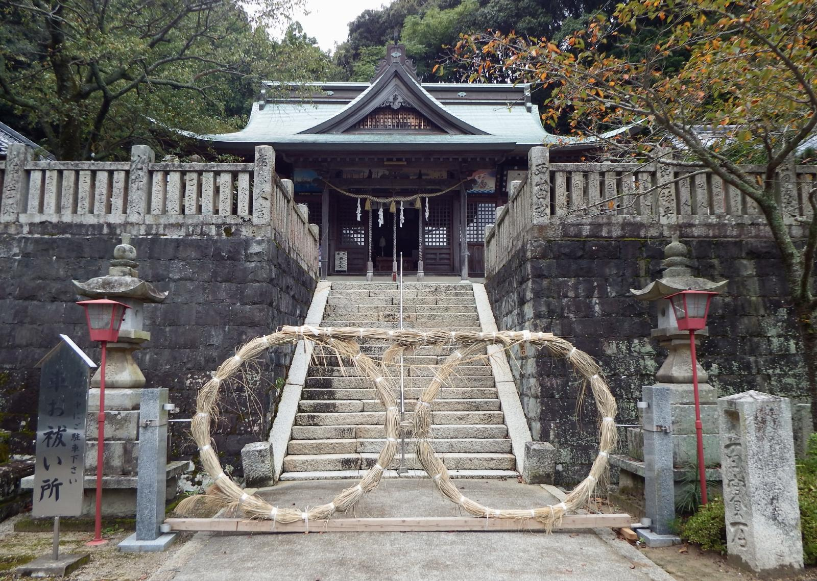 葛城神社の本殿